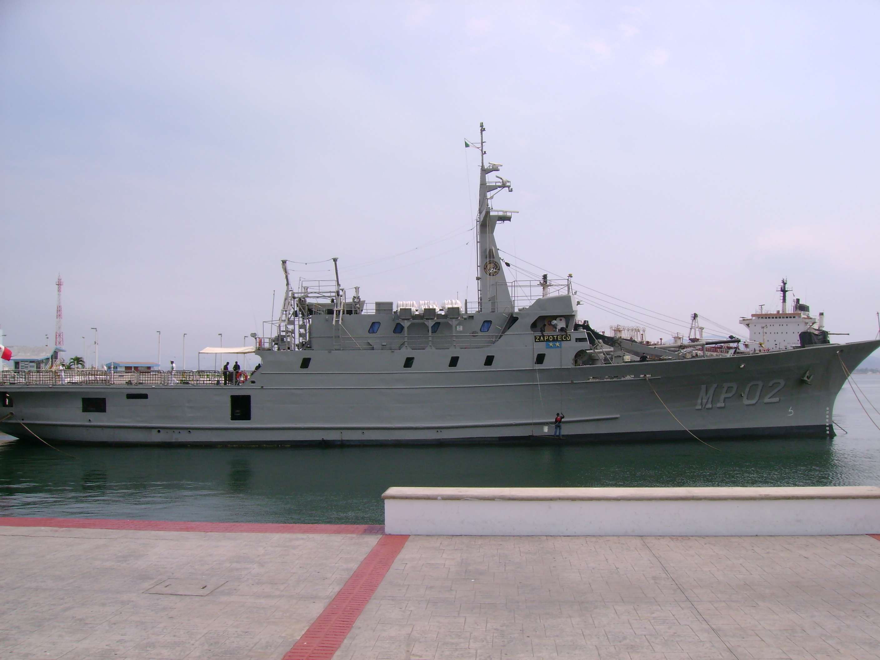 ARM Zapoteco en el puerto de Manzanillo, Colima, México